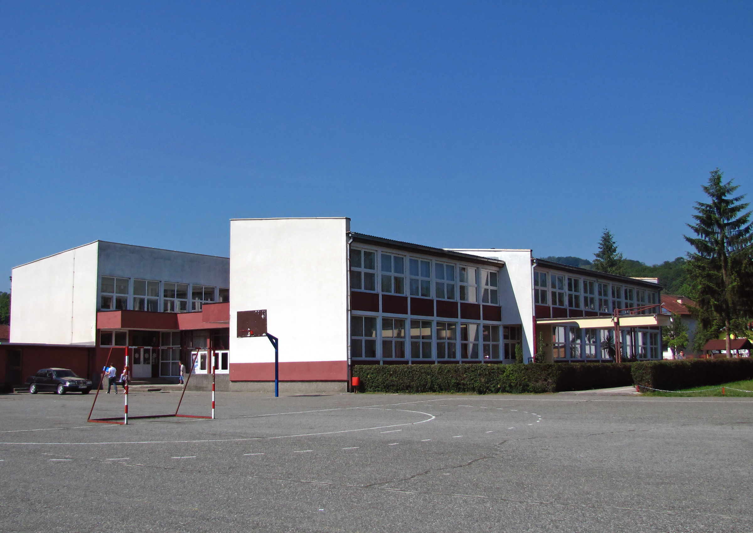 Основна школа "Јеврем Станковић" у Чечави